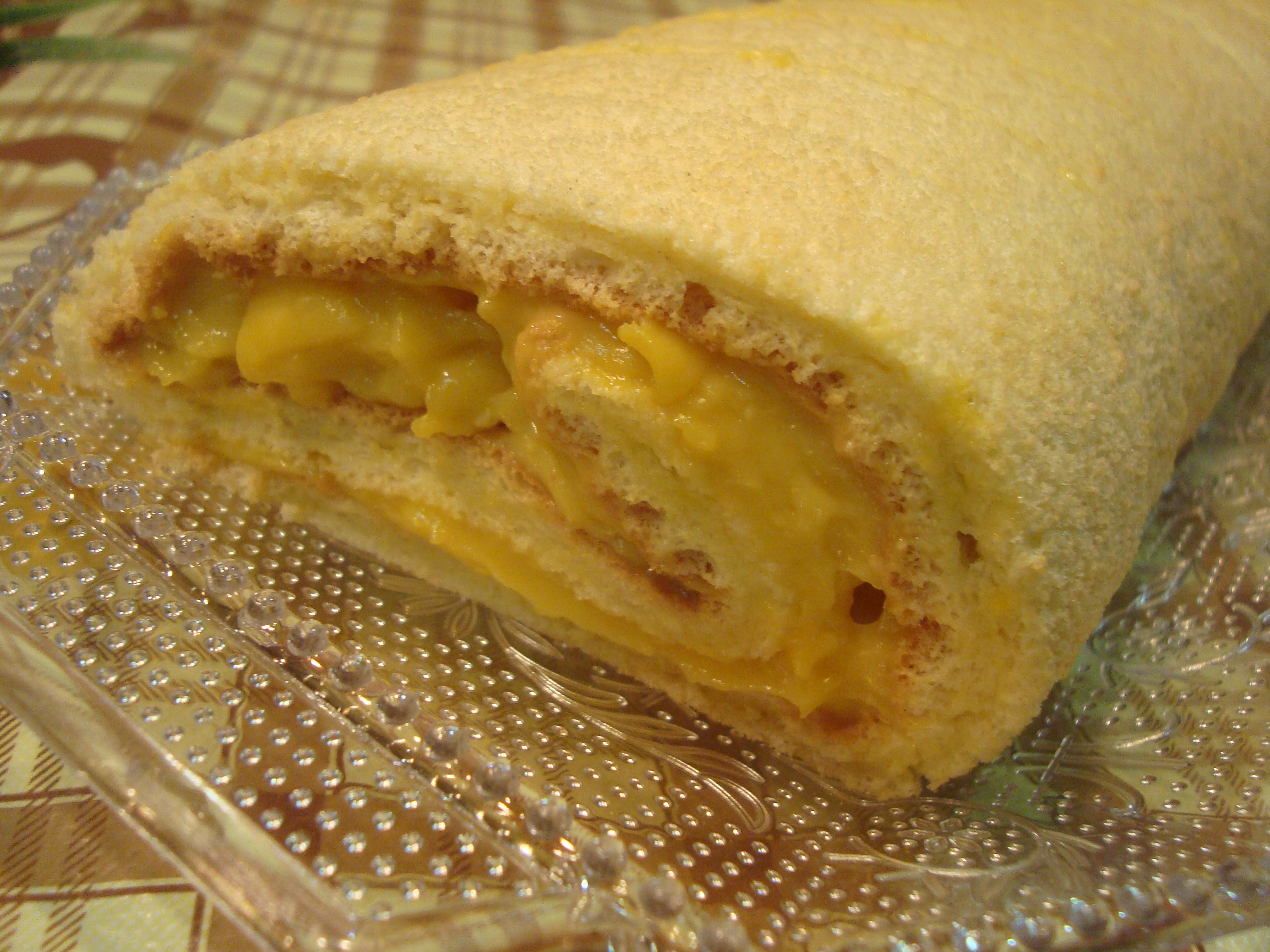 El brazo de gitano es un alimento típico de la repostería dulce valenciana